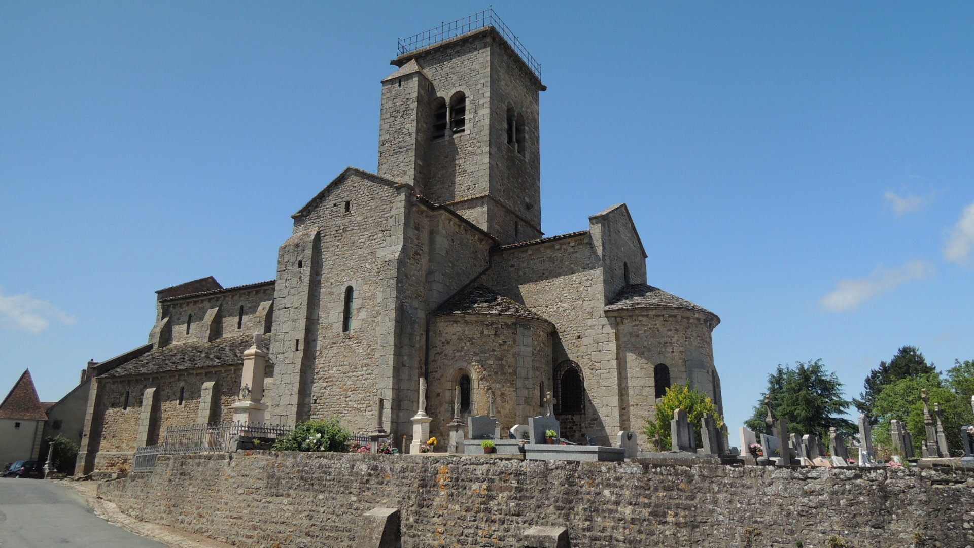 L’Église de Gourdon.